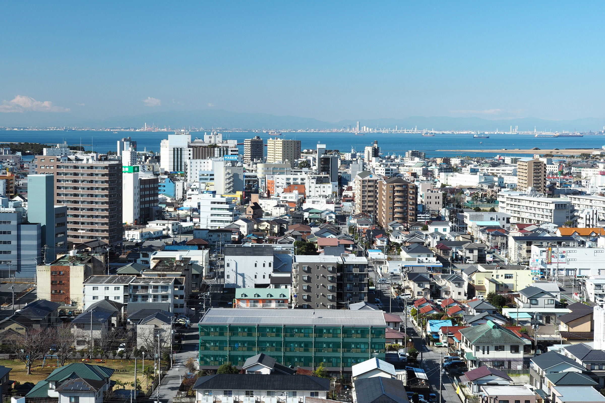 木更津市街地の全景（2019-01-01） 市内にある展望台「きみさらずタワー」から、投稿者が撮影を行った。